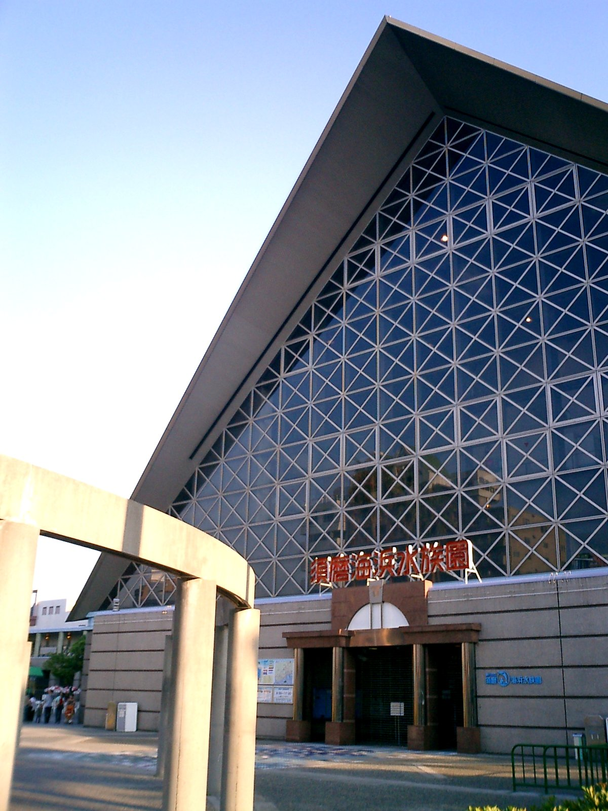 Suma_aqualife_park_in_Kobe